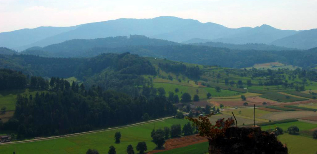 Beschreibung: Der Kandel von der Hochburg aus gesehen Fotograf: Bernd Gutmann Quelle: Selbst fotografiert am 31.07.2004 Lizenz: GFDL